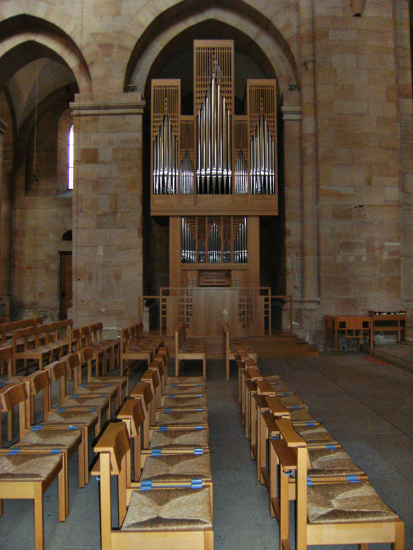 Kirchstraße 3: Simultanpfarrkirche Mariä Himmelfahrt; ehemalige Zisterzienserklosterkirche, Orgel